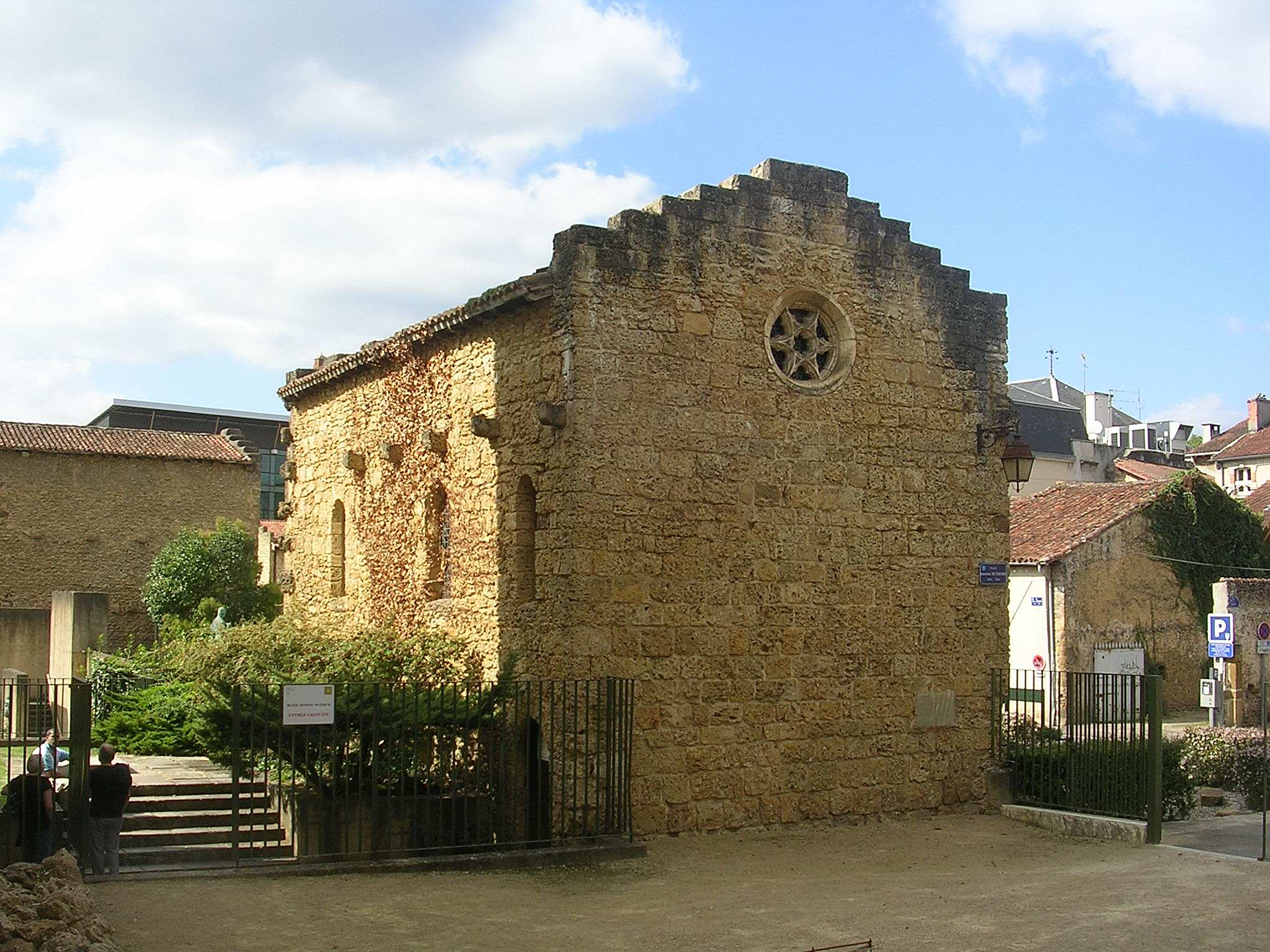 Ancienne chapelle romane de Mont-de-Marsan (proche du donjon Lacataye), dans le département français des Landes